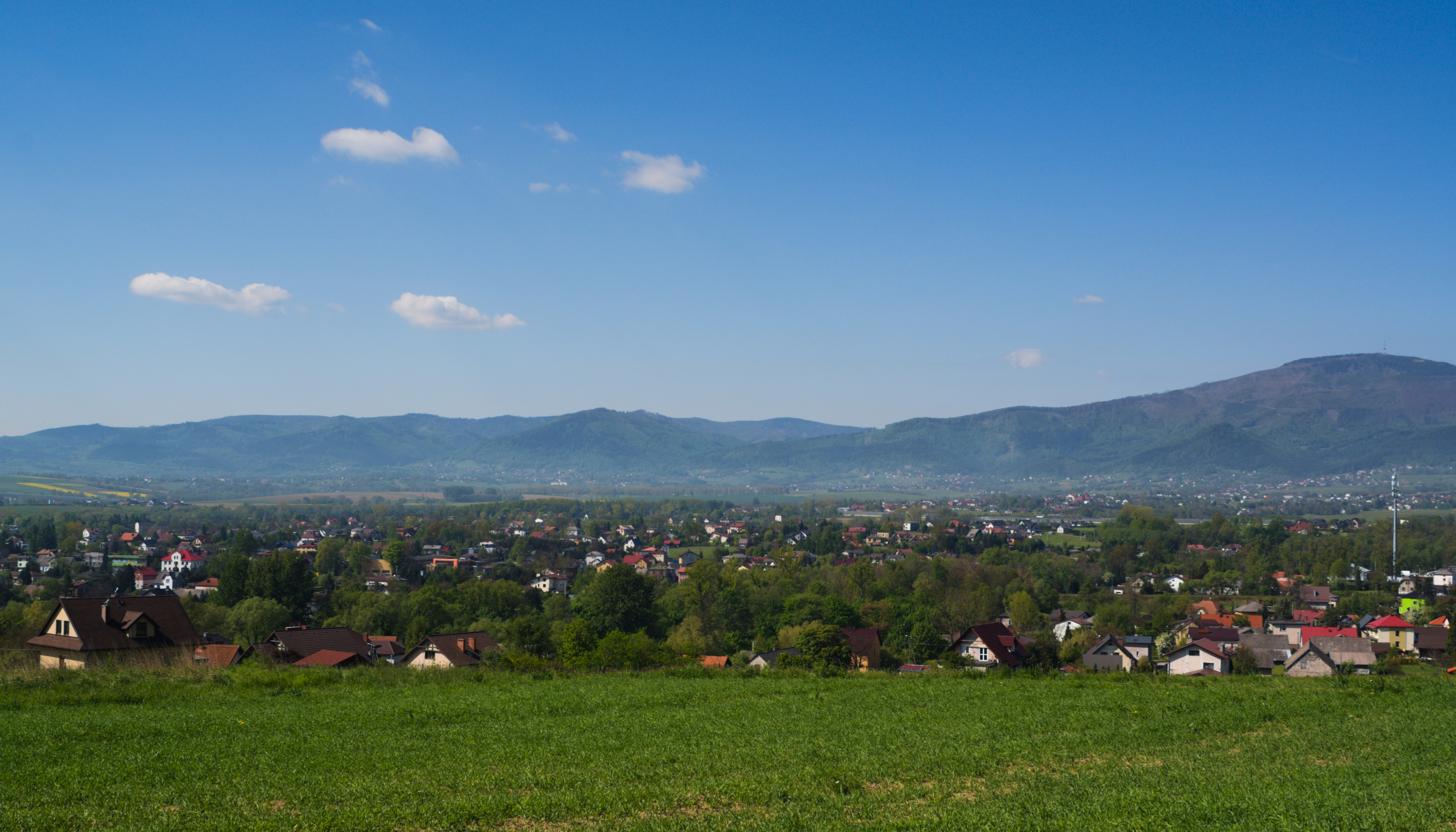 widok na Łodygowice z czerwonego szlaku (okolice ulicy Pod Groniem), z prawej Skrzyczne